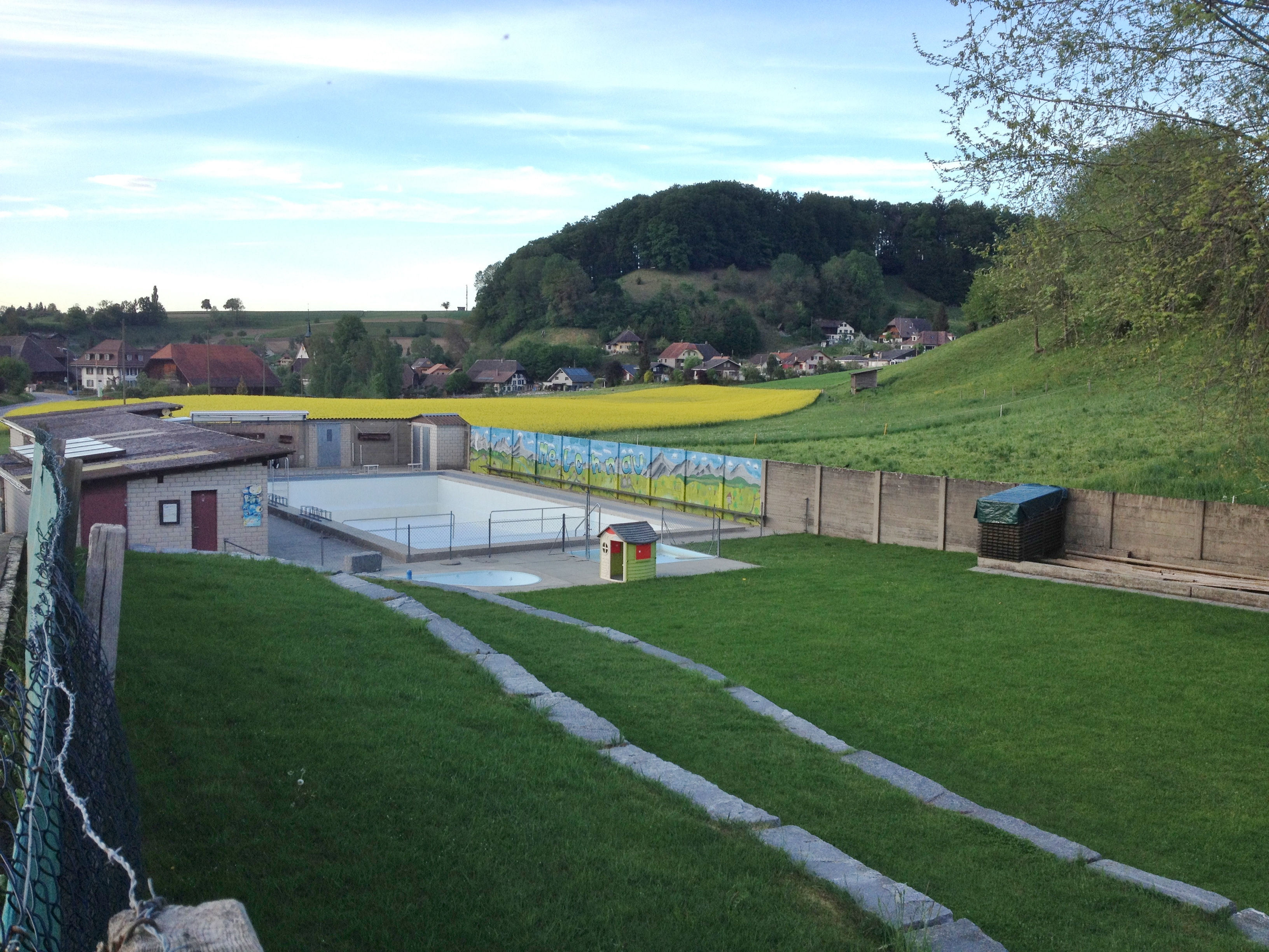 Freibad Melchnau, Baujahr 1928 mit Blick auf den Schlossberg